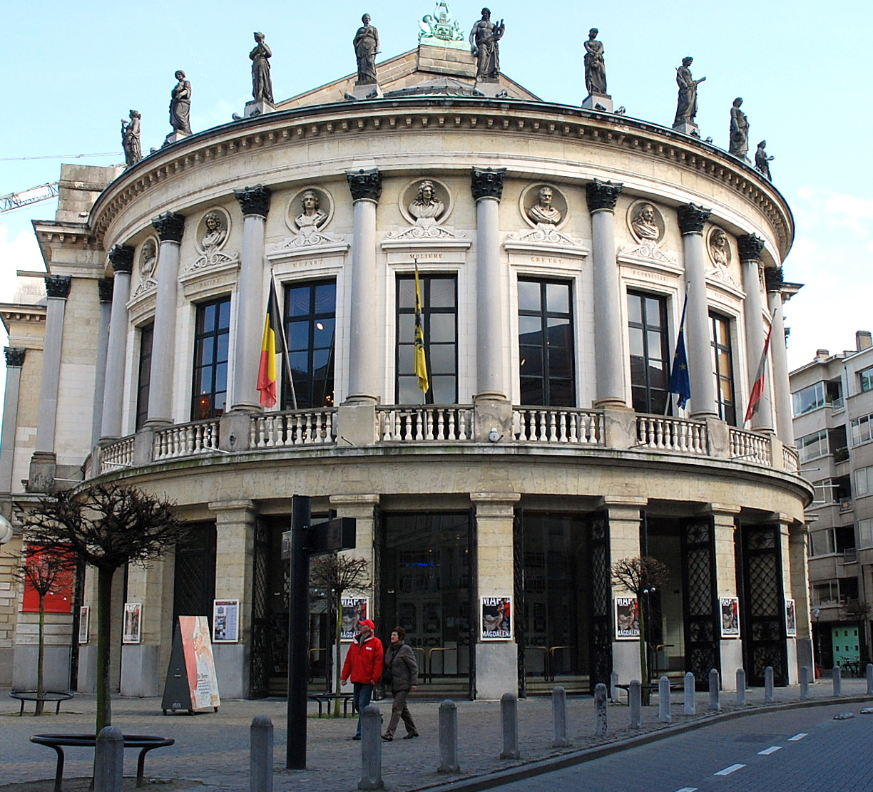 Bourlaschouwburg te Antwerpen (België)